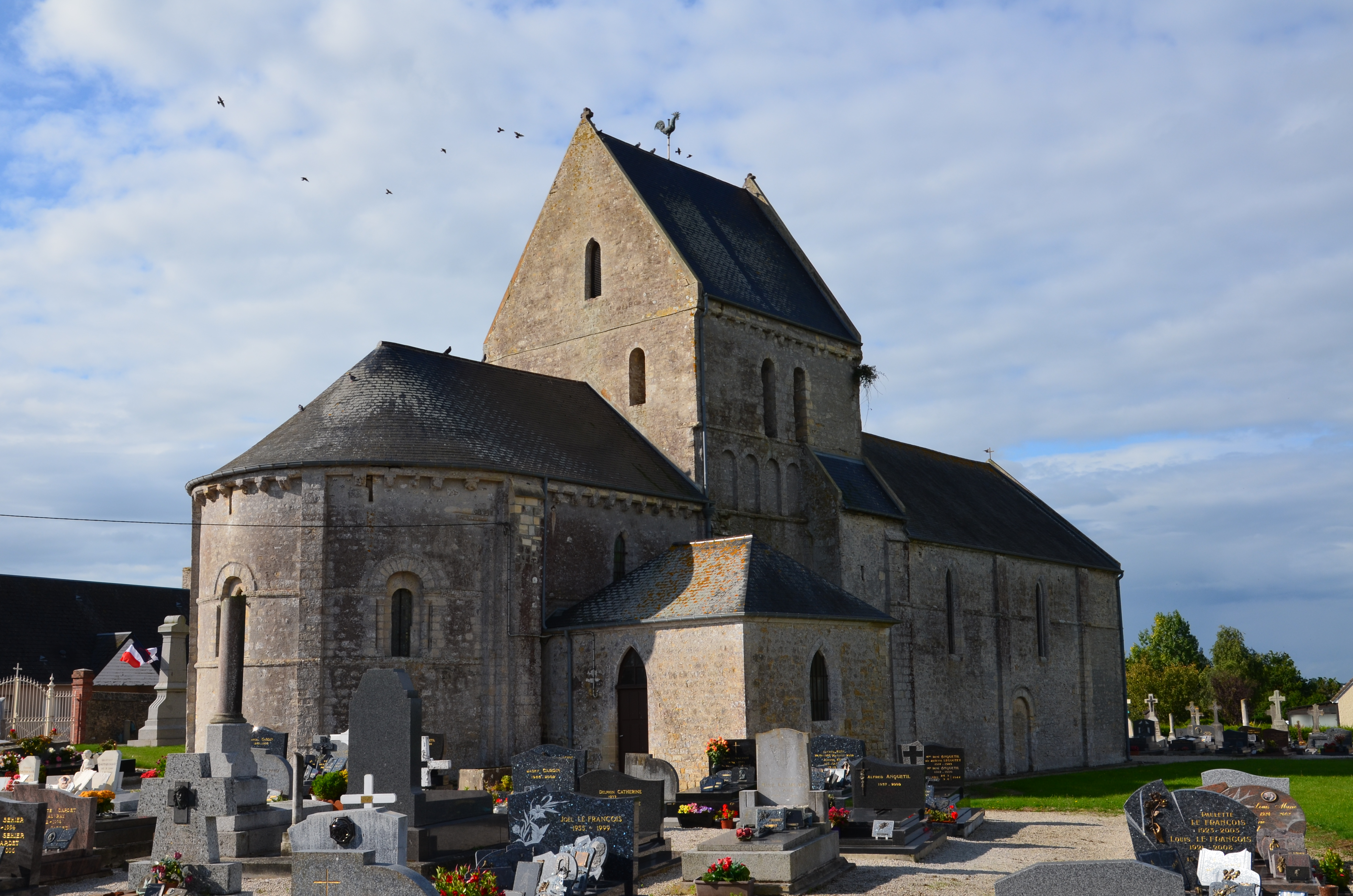 Église Saint-Martin d'Osmanville.